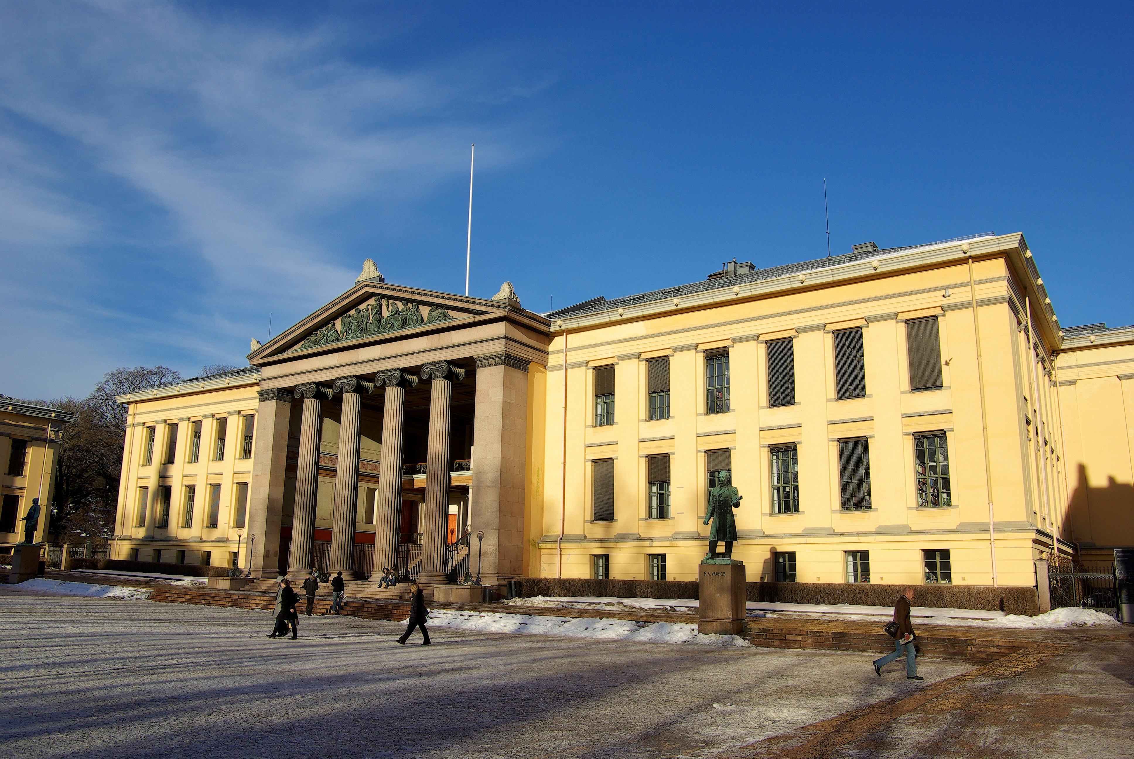 Oslo Universitet, juridisk fakultet, Oslo, Norway.